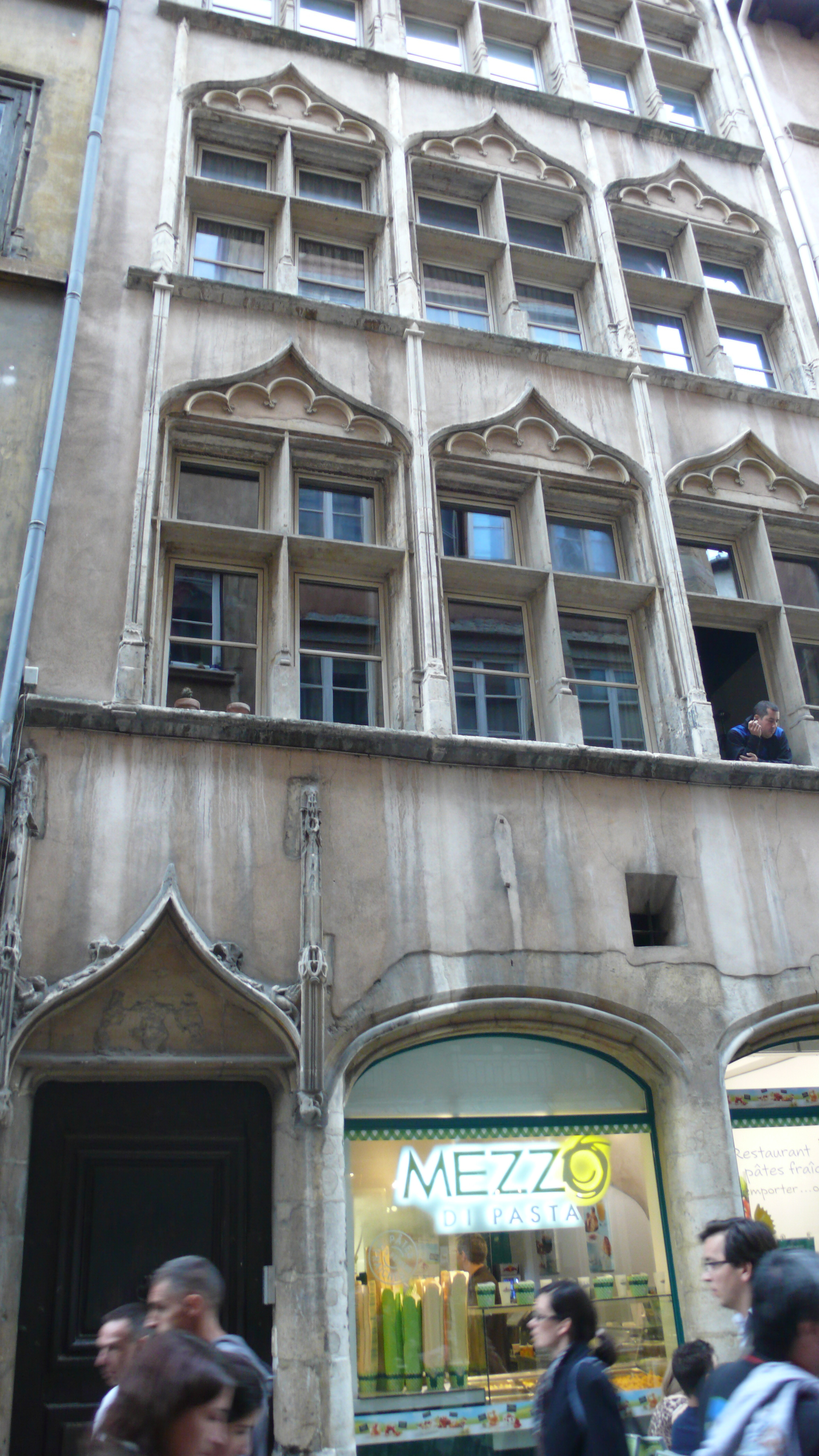 Maison 7 rue Saint-Jean (référence: Mezzo di pasta) .